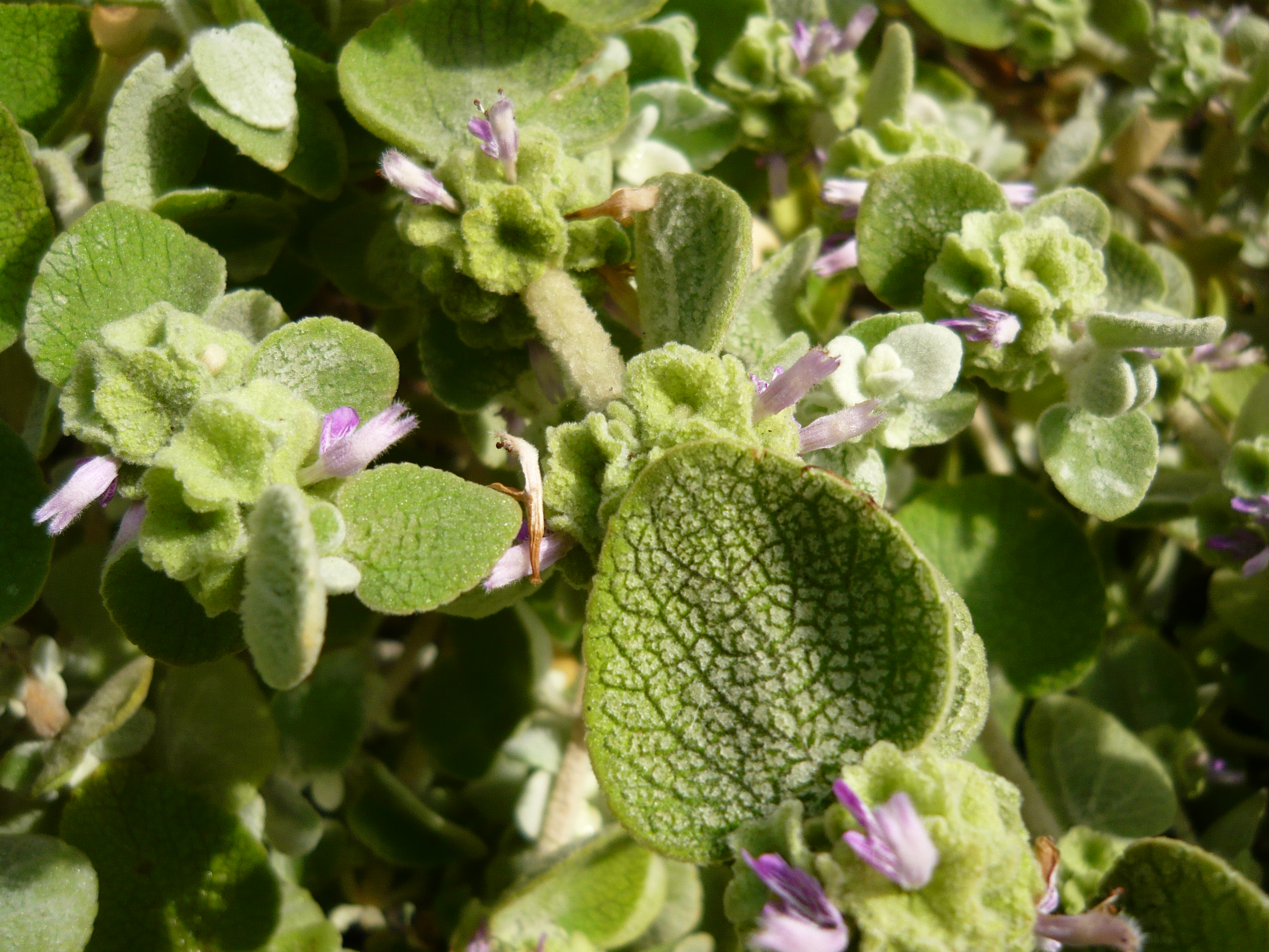 Ballota acetabulosa. Real Jardín Botánico, Madrid, España.